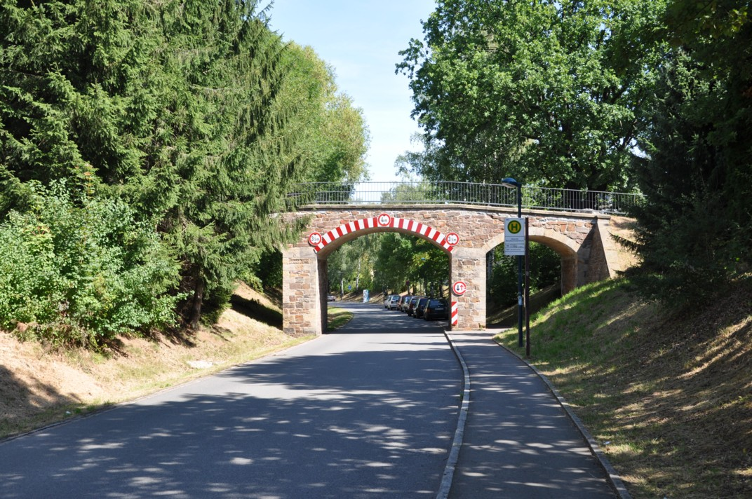 ehem. Kohlenbahn Oelsnitz-Kaisergrube